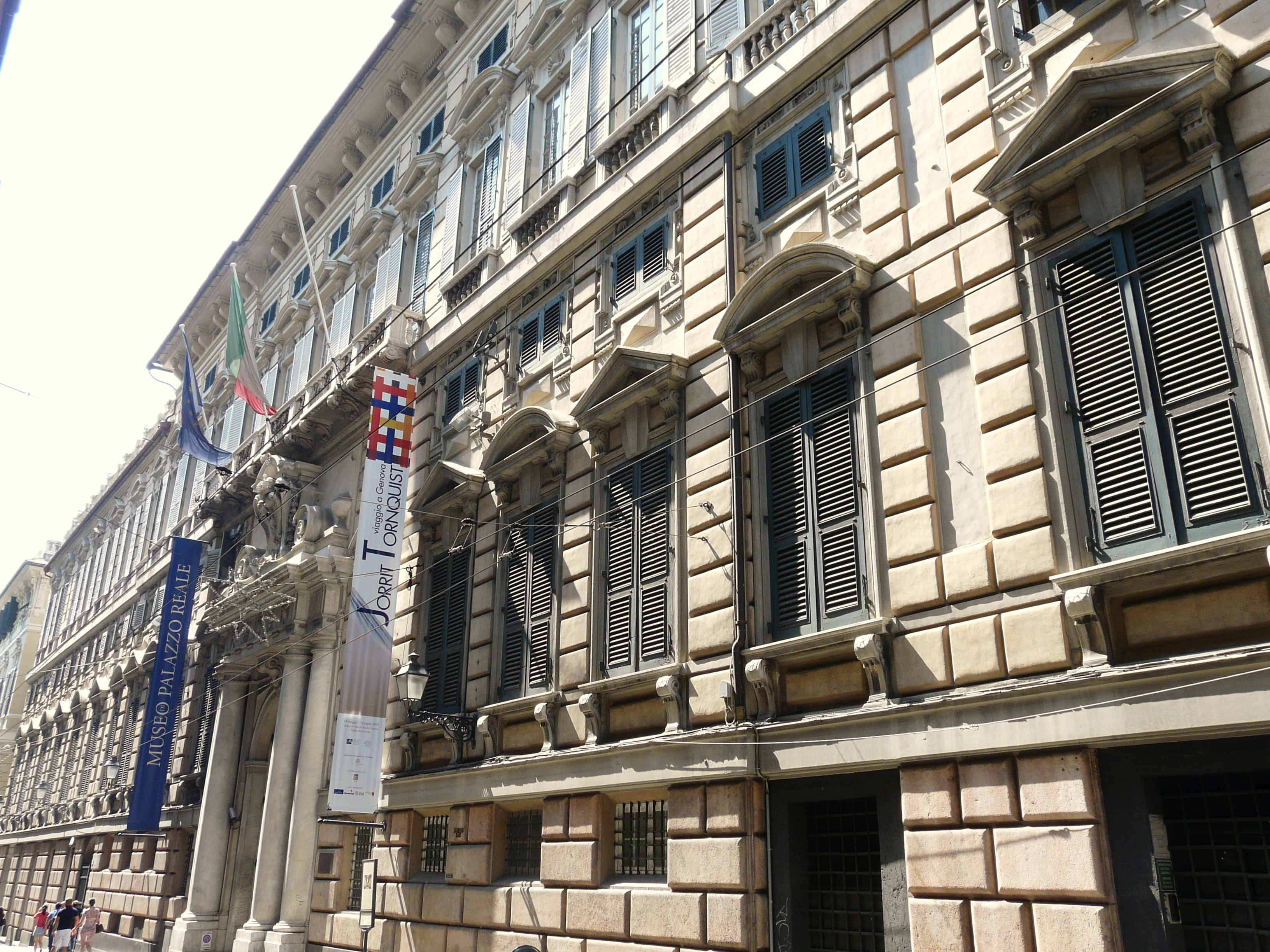 Palazzo Reale, Genova, Liguria, Italia